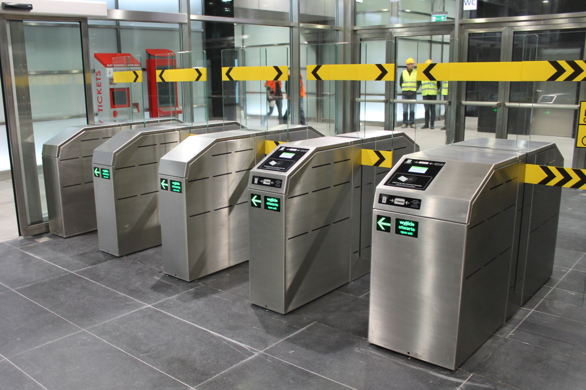 Bramki biletowe w zachodniej hali odpraw stacji C9 Rondo Daszyńskiego.